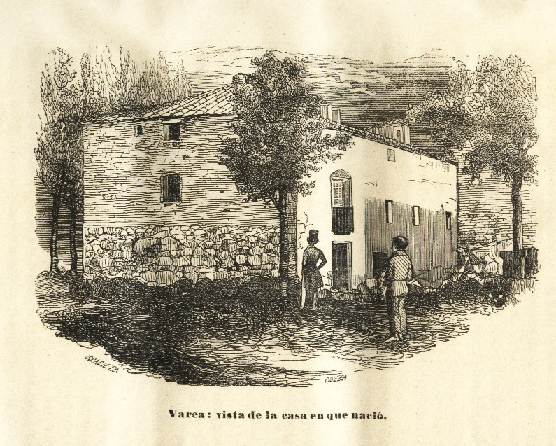 Casa natal de Martín Zurbano en Varea (La Rioja). "Historia de la vida militar y política de D. Martin Zurbano". Por una sociedad de patriotas. Madrid 1845.